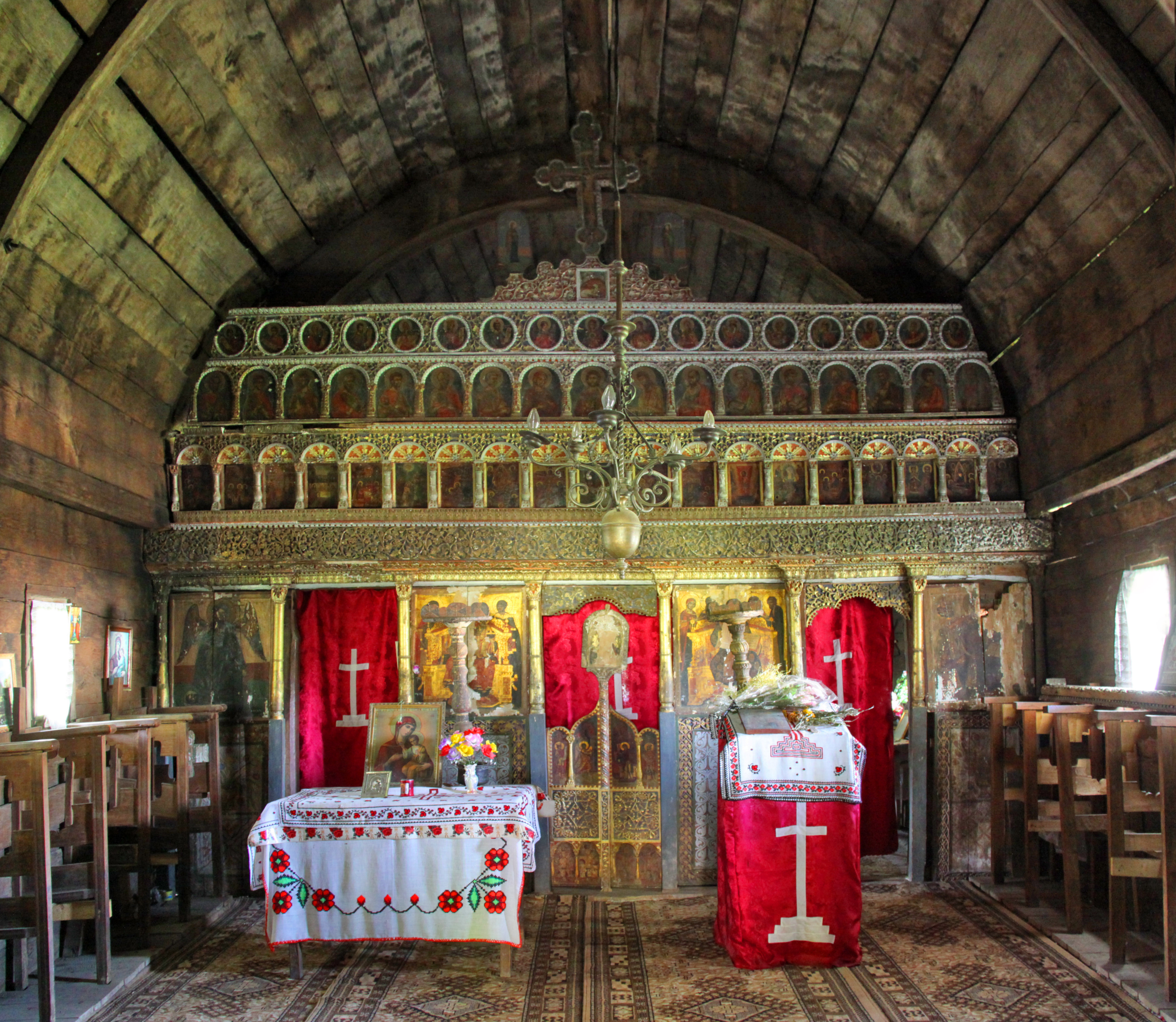 Biserica de lemn din Zătreni: interiorul navei, vedere spre iconostas